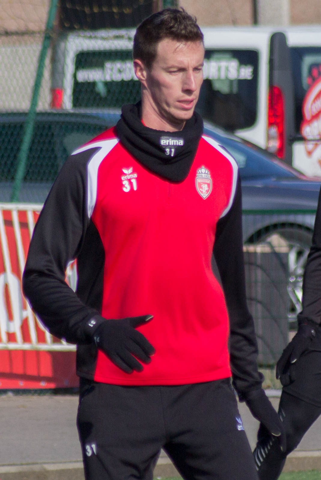 Entrainement du Royal Excel Mouscron, Futurosport, Mouscron. Le 22 Février 2018.